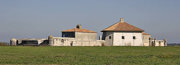 Fort Lupin, côté terre - Charente-Maritime Photo issue de ma banque d'images : Pep.per 15 octobre 2006 à 00:44 (CEST)